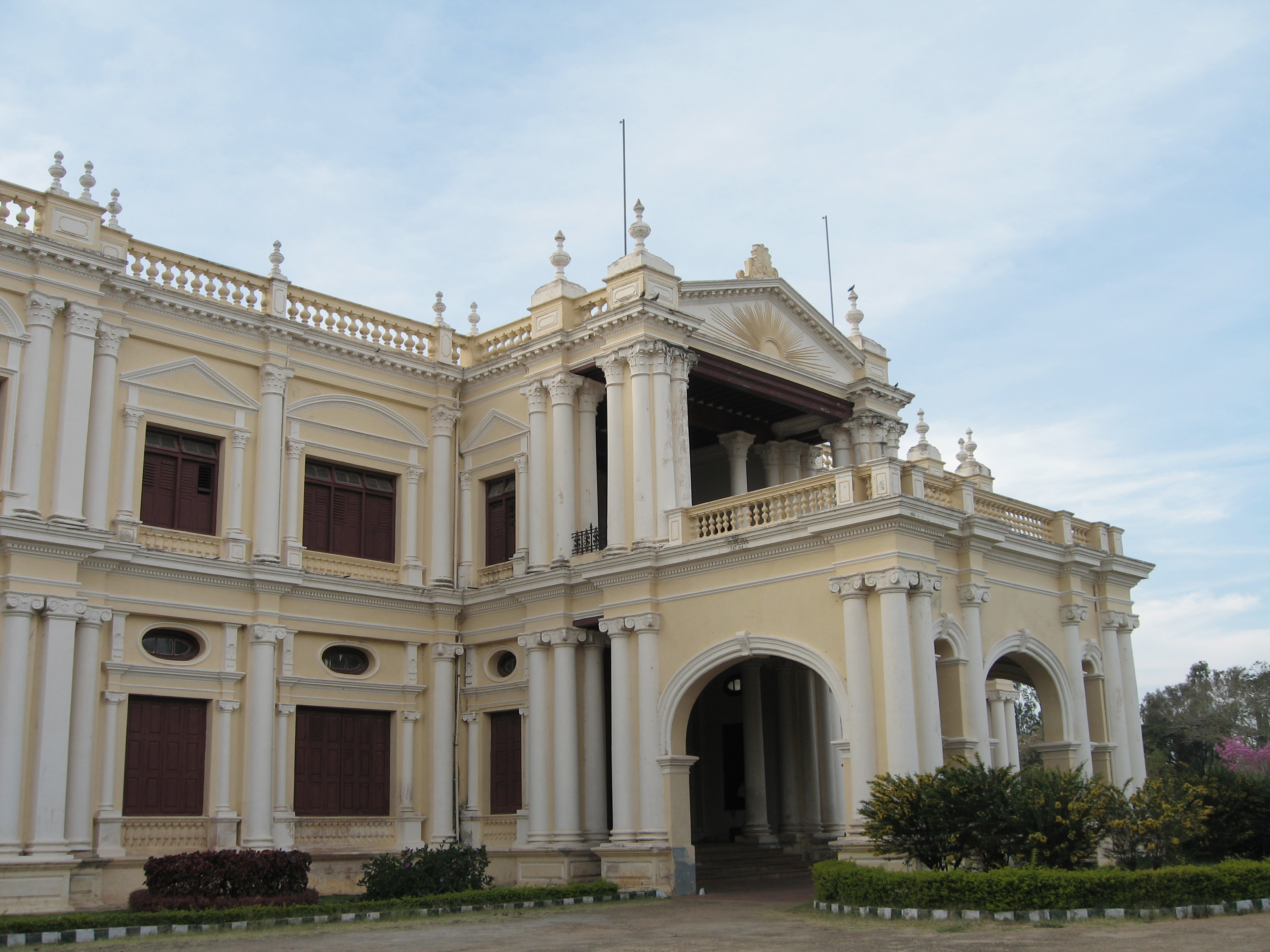 The Jayalakshmi Vilas mansion in Manasagangotri, Mysooru, INDIA. Belongs to the Wodeyar kings of Mysooru.